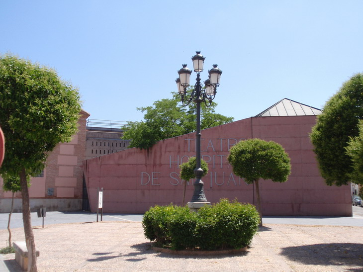 Almagro. Hospital de San Juan.